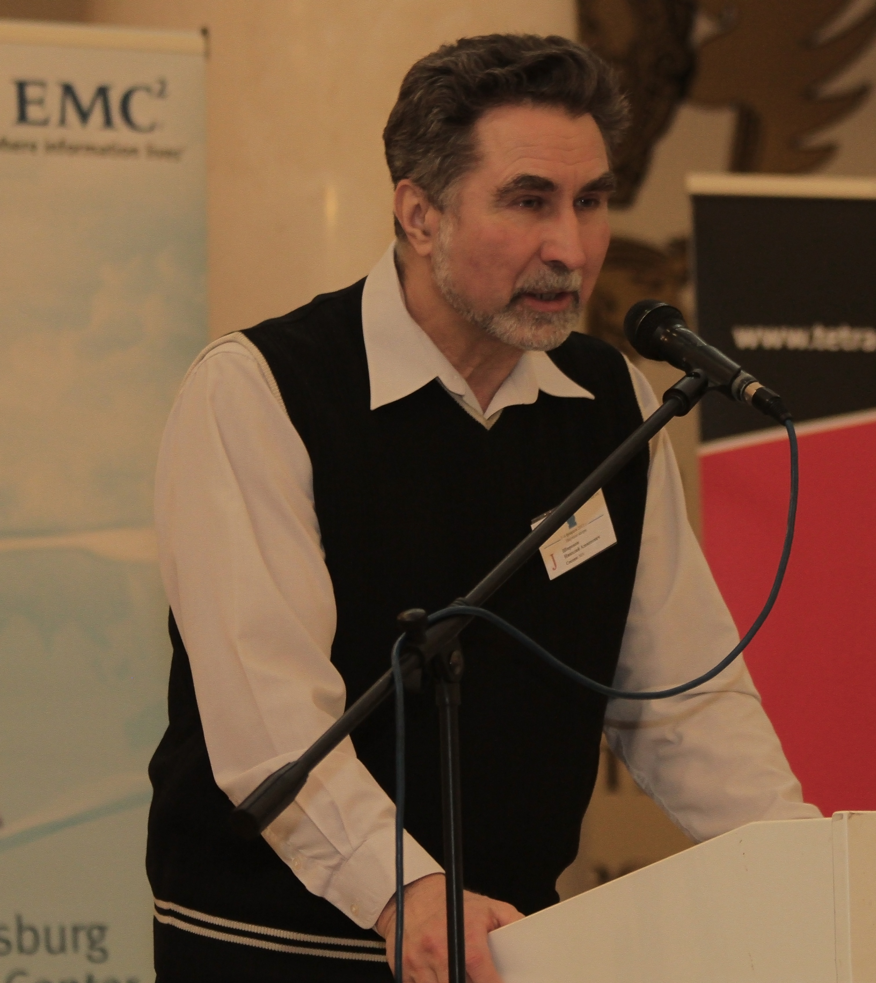 заведующий кафедрой математического анализа Математико-механического факультета СПбГУ